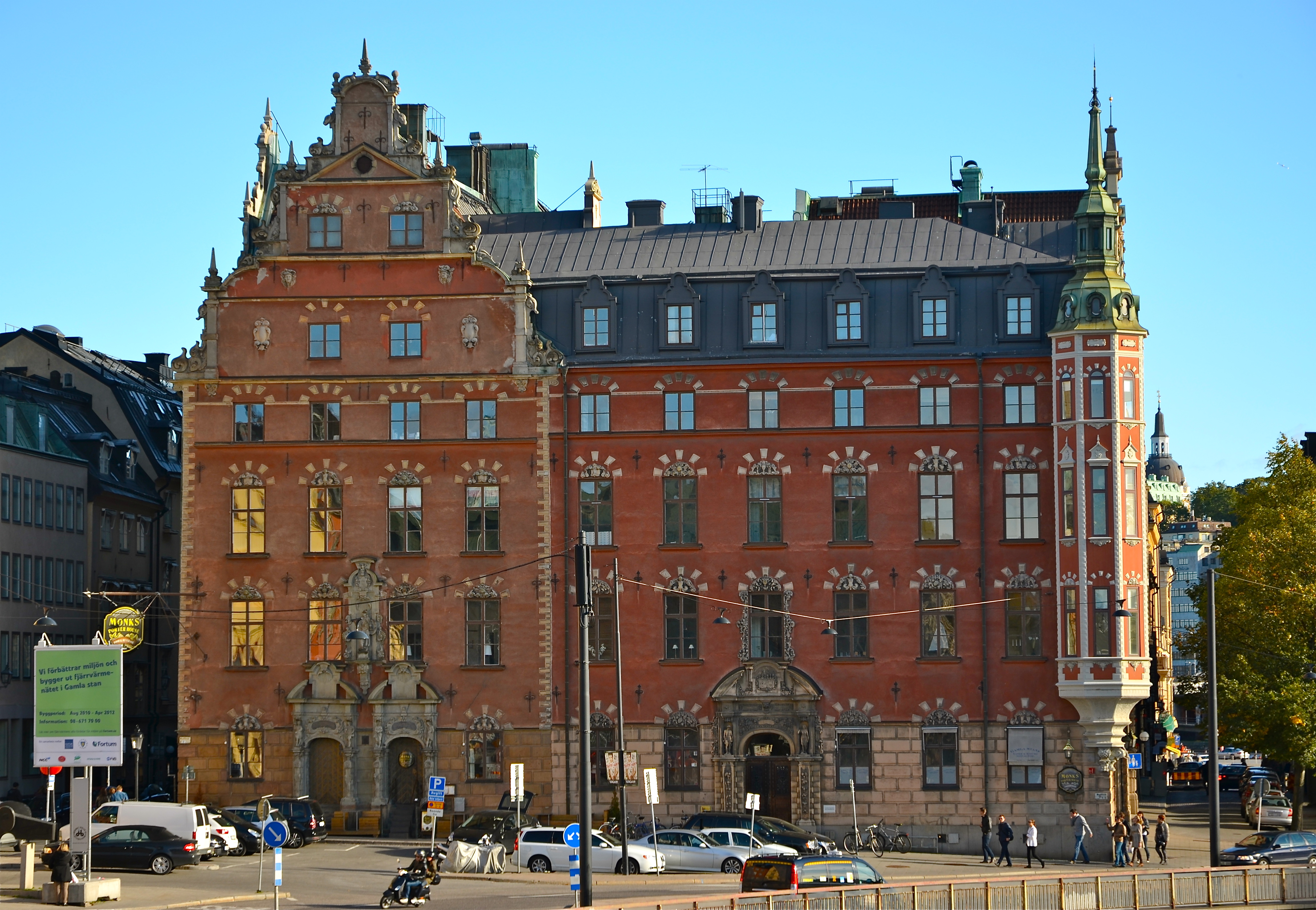 Dubbelportalen vetter mot Munkbron.